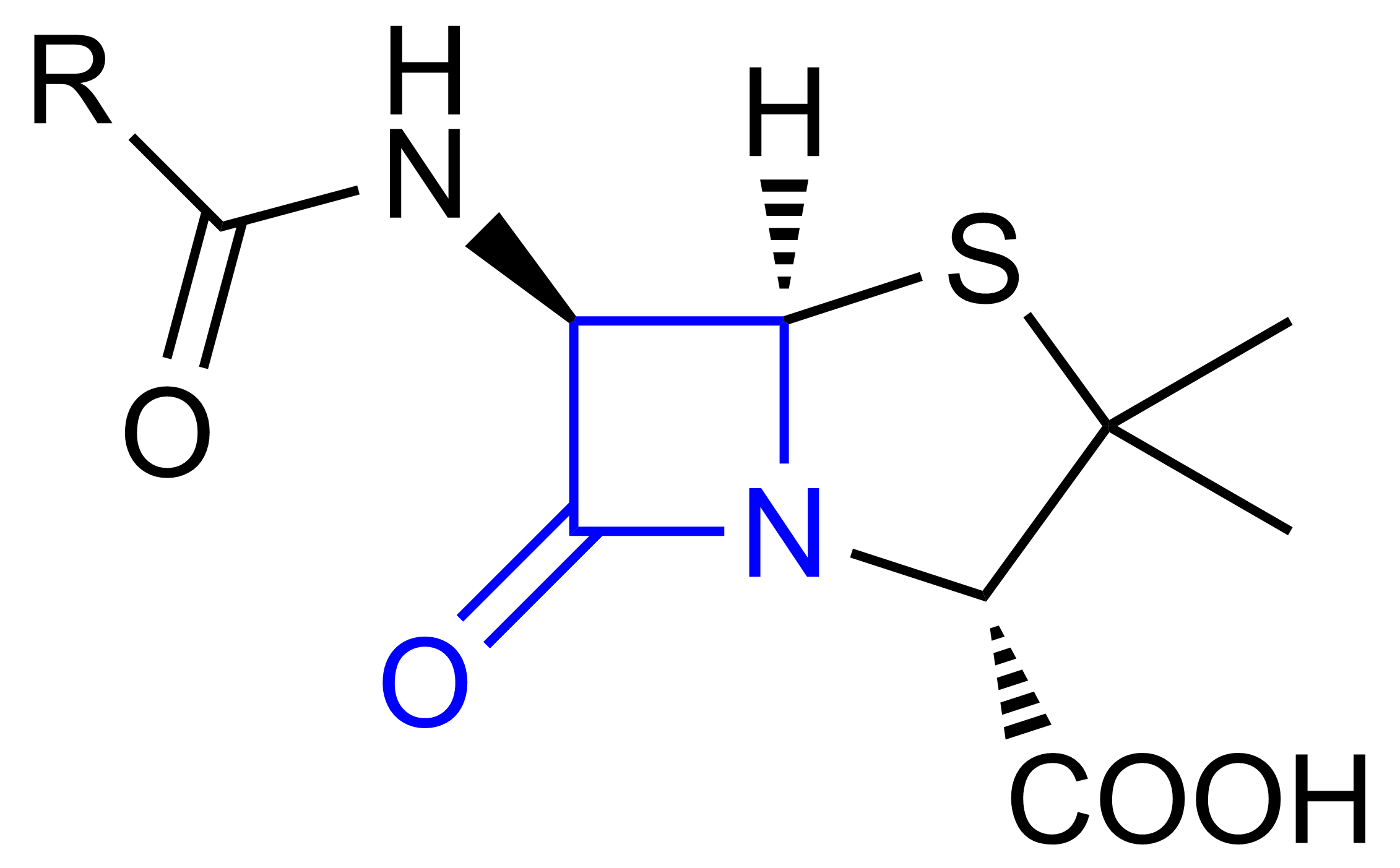 Bètalactamantibioticum